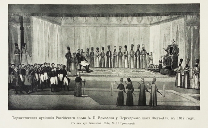 Торжественная аудиенция Россиского посла А. П. Ермалова у Персидского шаха Фетъ-Али, в 1817 году